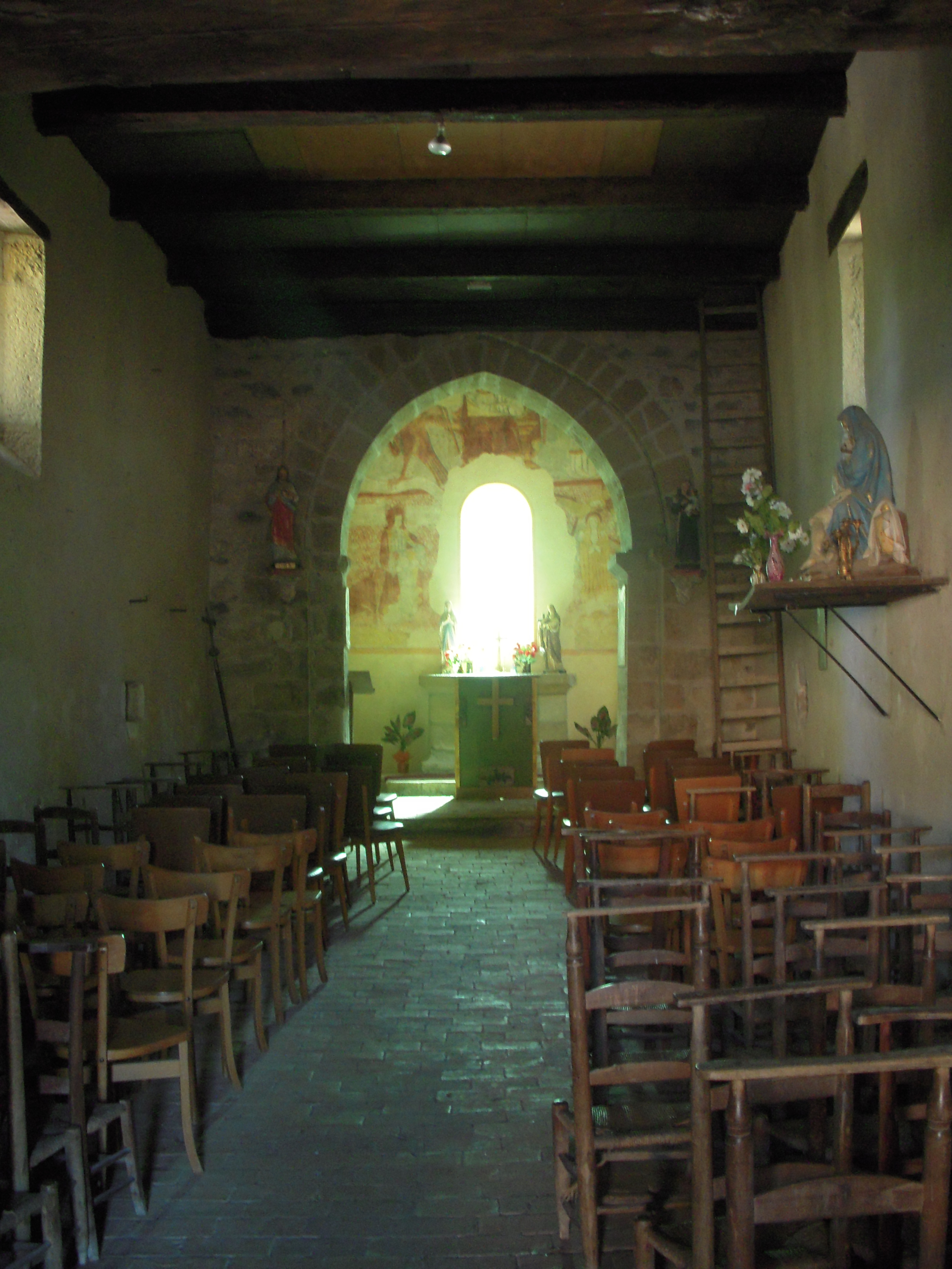 Chapelle Sainte-Marie-Madeleine de Guirande (Felzins) - Vue intérieure